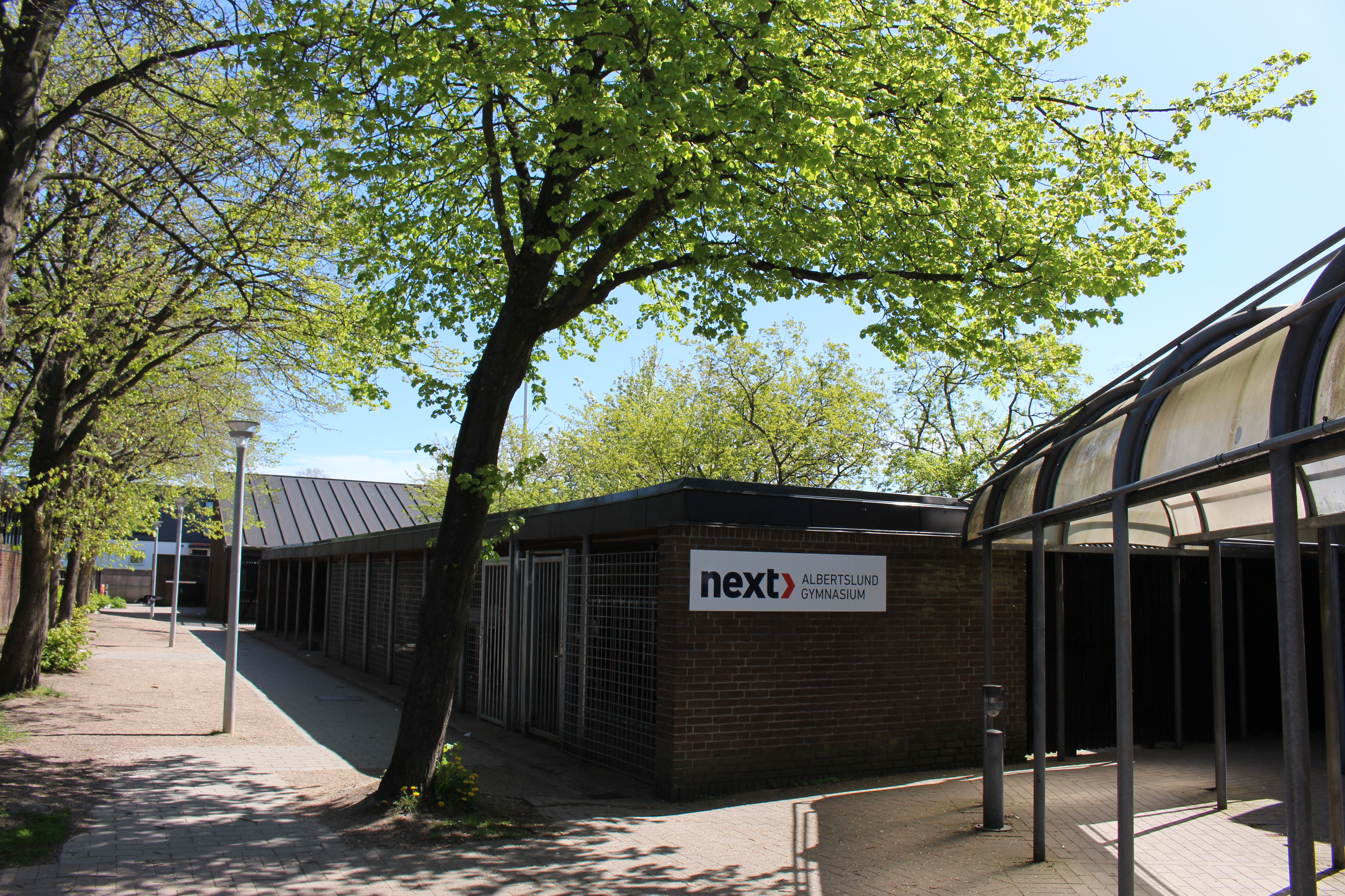 Albertslund Gymnasium